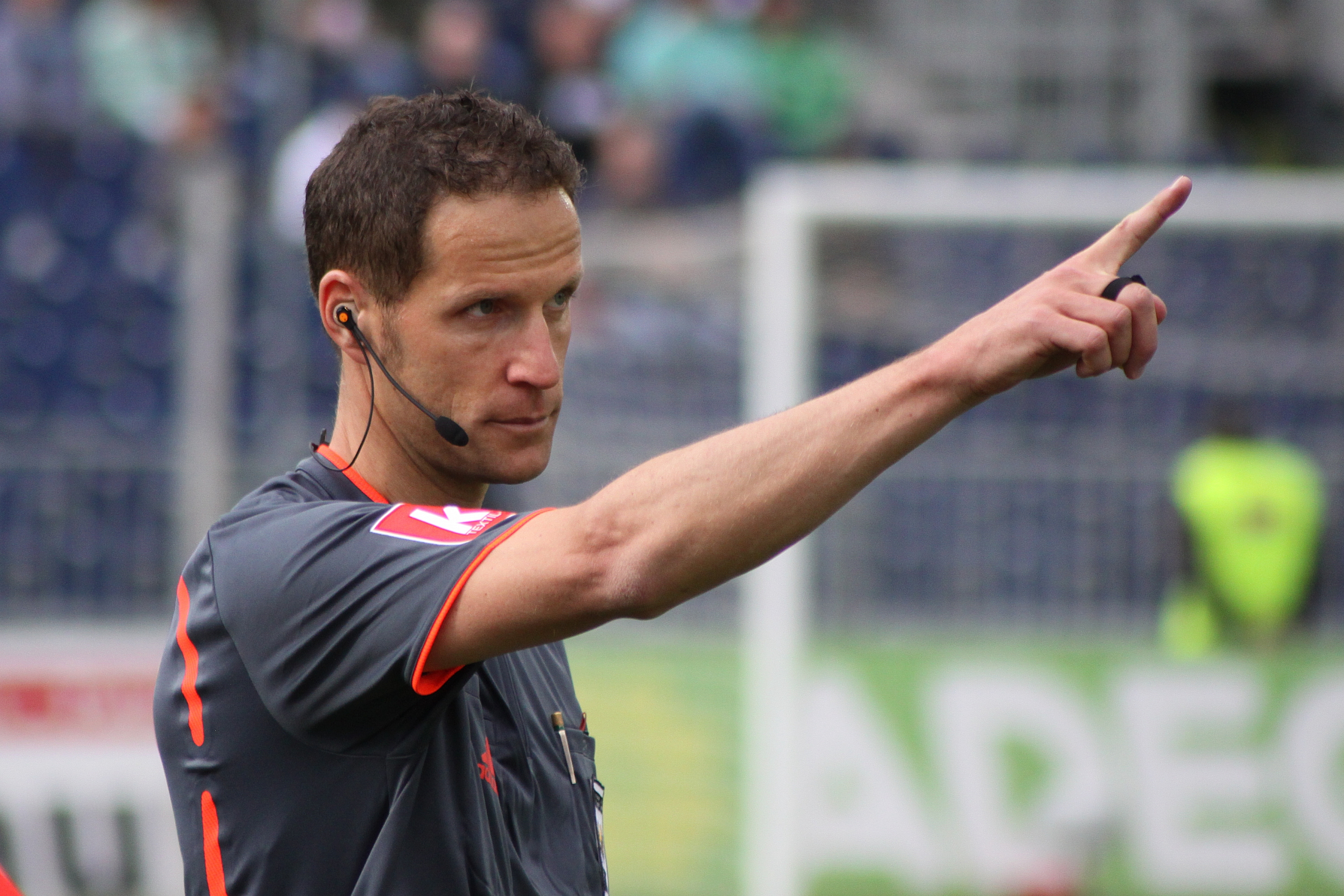 Robert Schörgenhofer - österreichischer Fußballschiedsrichter (Bild 2)